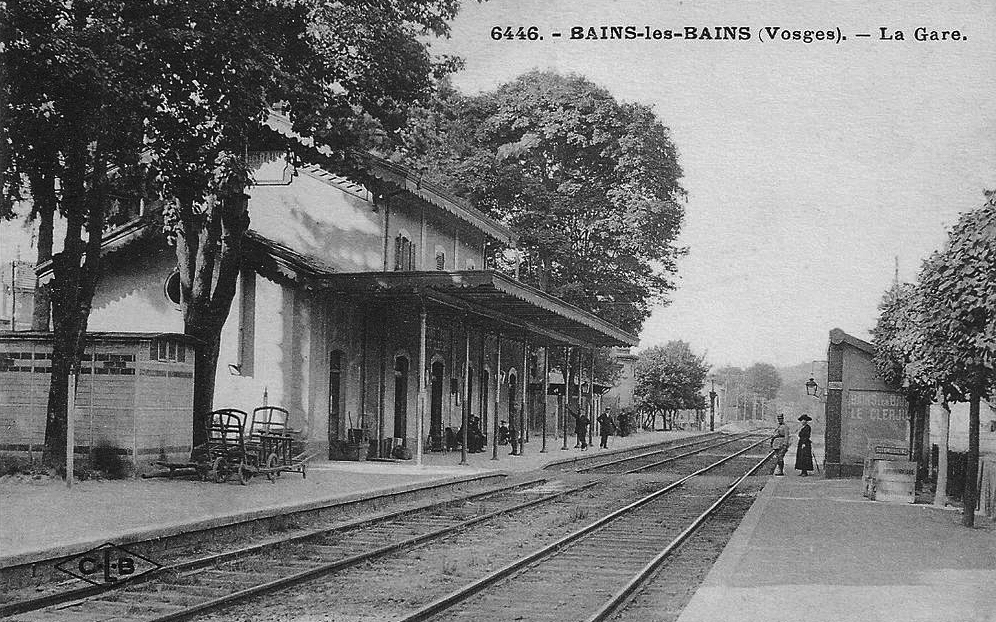 Intérieur de la gare de Bains-les-Bains au début des années 1900.